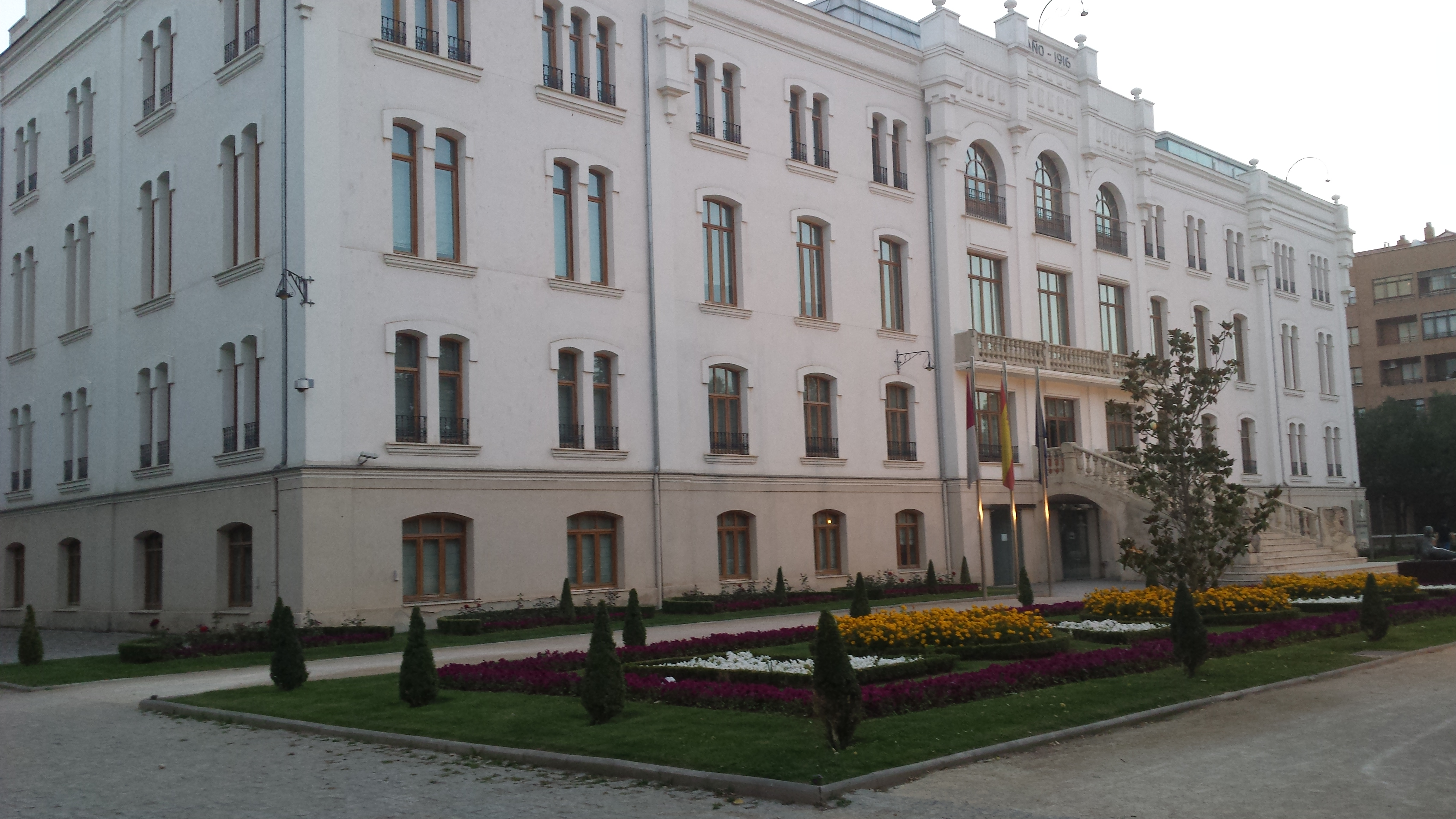 Fábrica de Harinas de Albacete. Junta de Comunidades de Castilla-La Mancha. Albacete